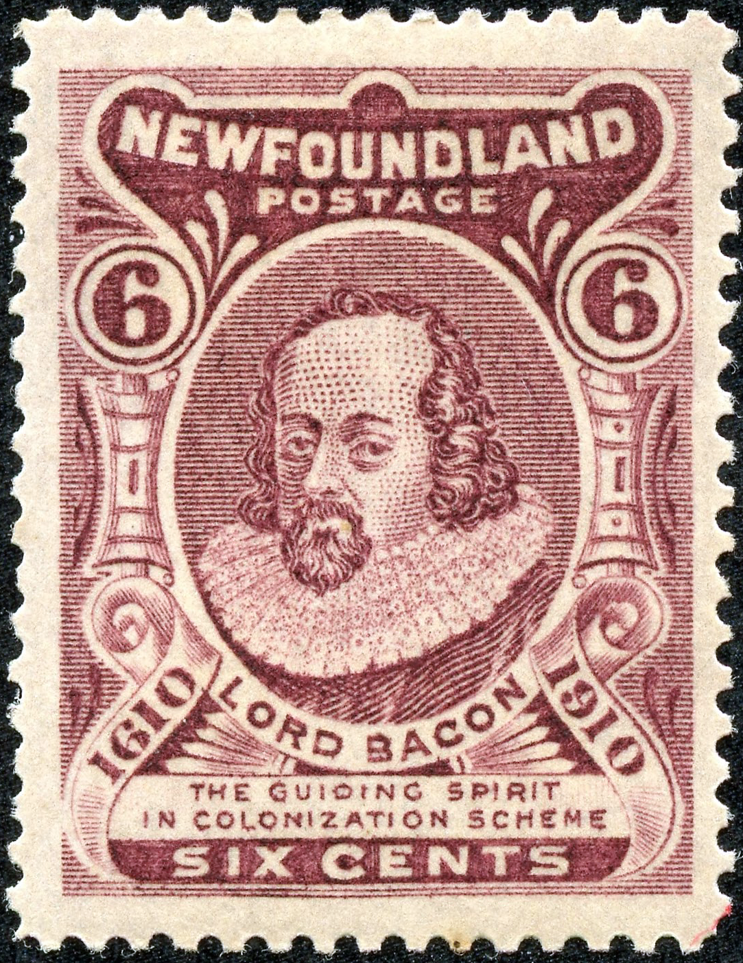 Lord Bacon